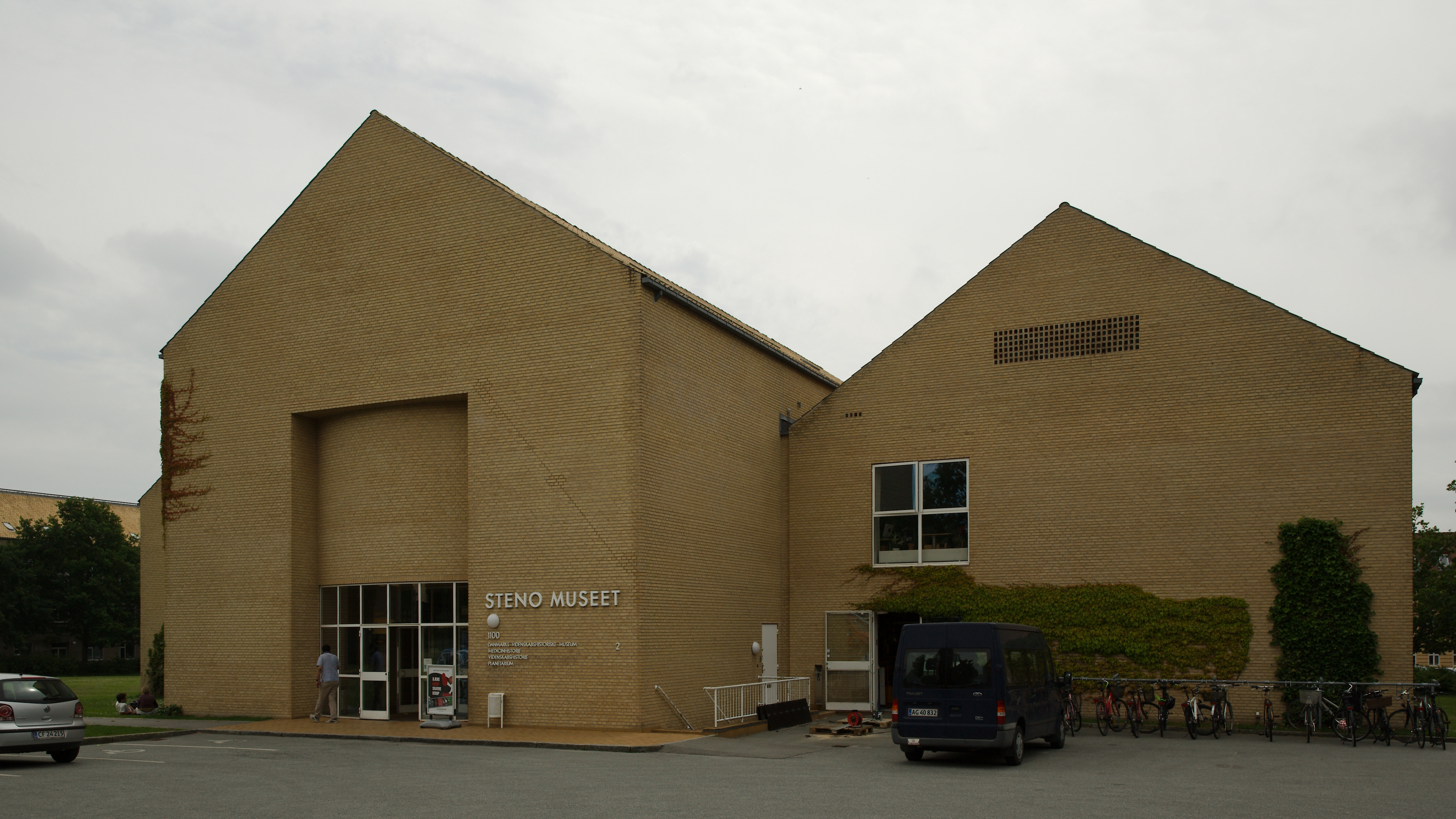 Steno Museet